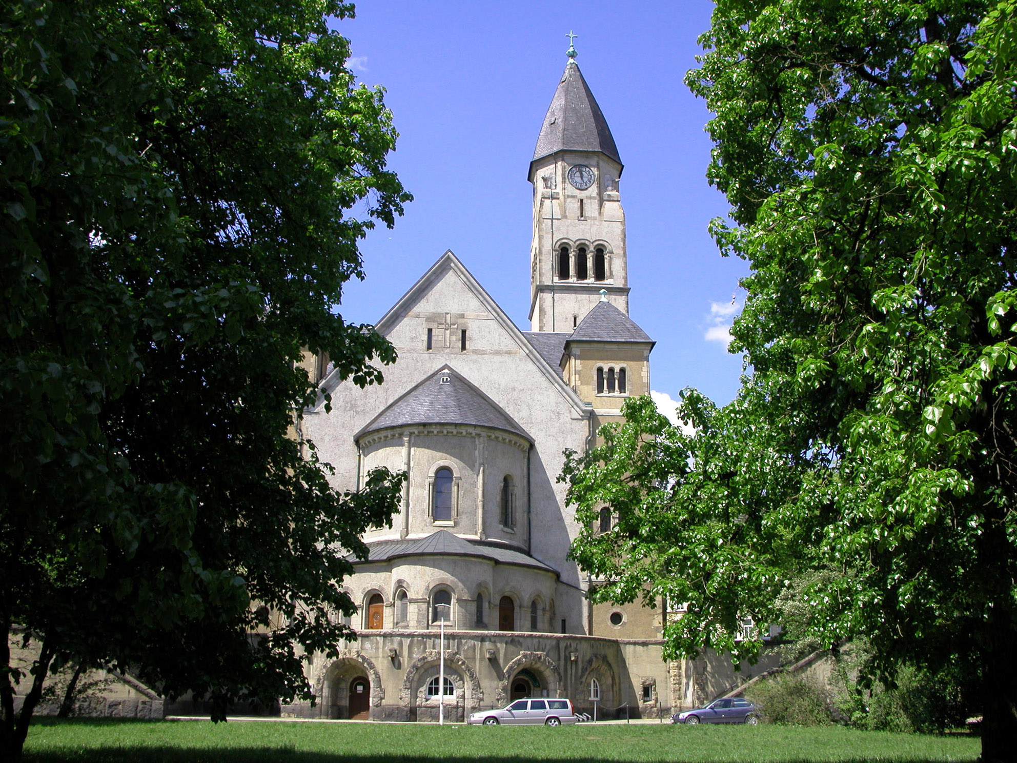 Plauen - Haselbrunn/Markuskirche